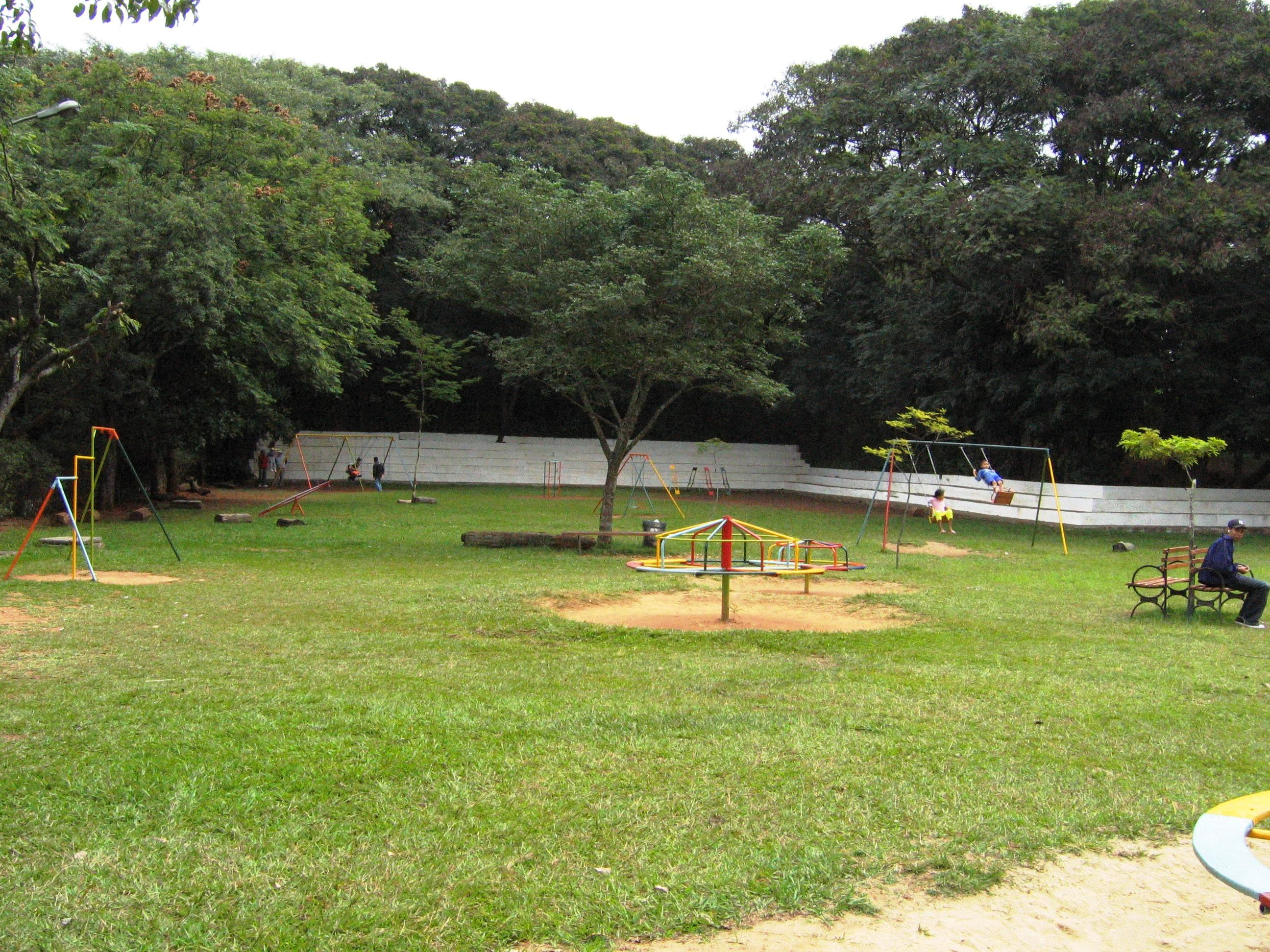 Playground do Parque Previdência do município de São Paulo